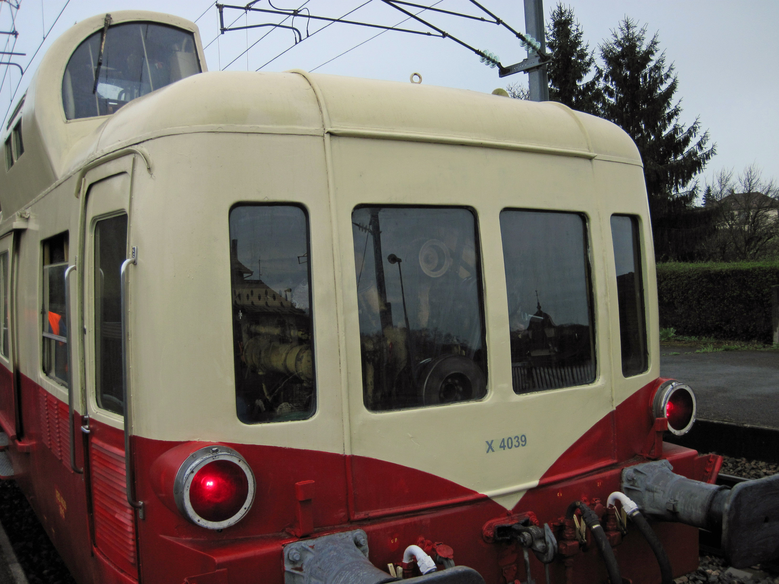 Vue du compartiment moteur d'un autorail de la série SNCF X3800. Le véhicule est le X 4039 préservé par l'association des Autorails de Bourgogne et Franche-Comté.